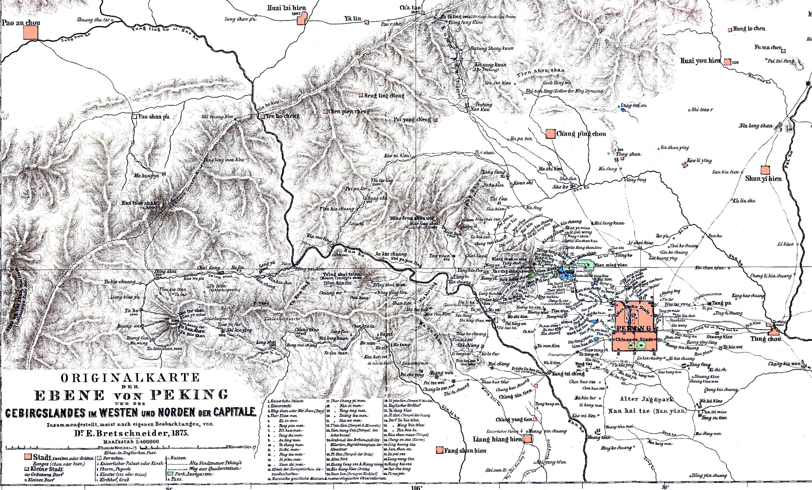 Original Karte der Ebene von Peking und des Gebirgslandes im Westen und Norden der Capitale / zusammengestellt, meist nach eigenen Beobachtungen, von E. Bretschneider, 1875. (In Die Pekinger Ebene und das benachbarte Gebirgsland / von E. Bretschneider. Gotha : J. Perthes, 1876). Scale [ca. 1:250,000]